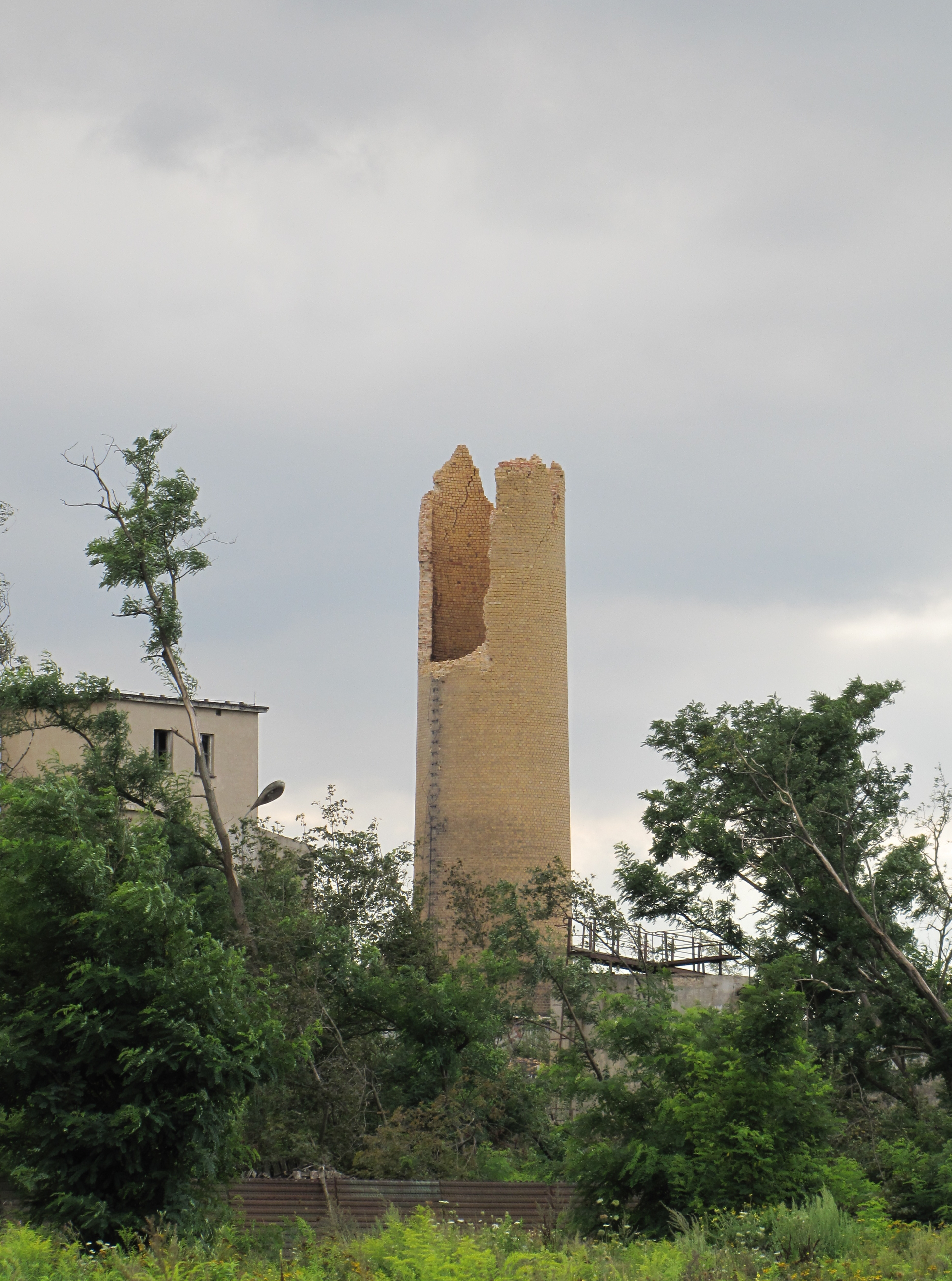 Papierfabrik Großenhain - Nordansicht - mit dem beim Tornado am 24. Mai 2010 eingestürzten Schornstein (Höhe vor Einsturz 96 m)